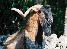 Boc de la raça de cabra mallorquina